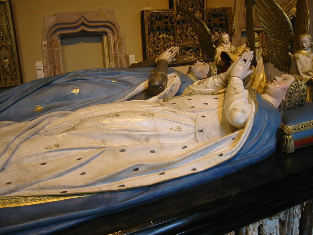 Gisant du duc Jean Sans Peur et Marguerite de Bavière